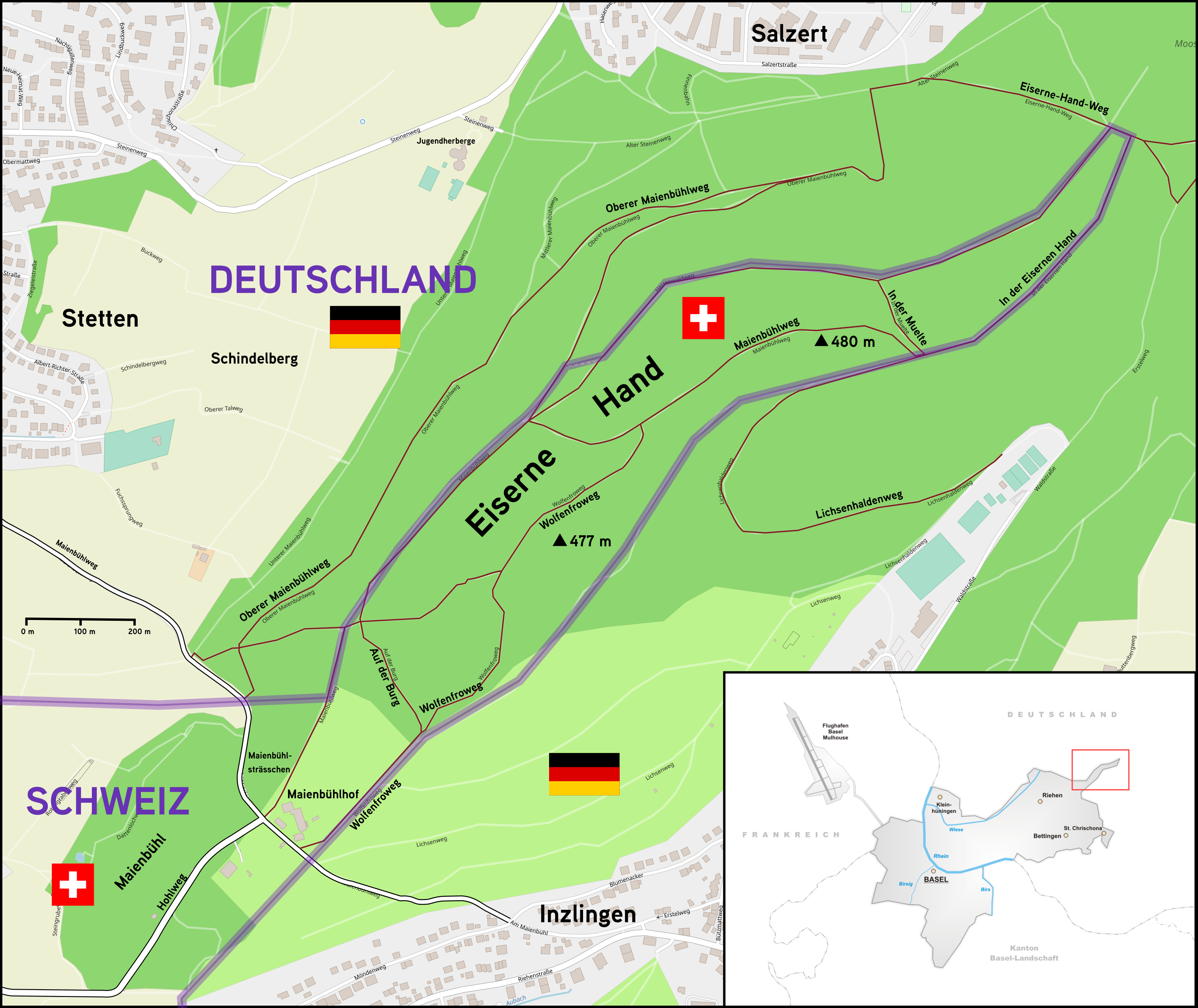 Karte der Eisernen Hand